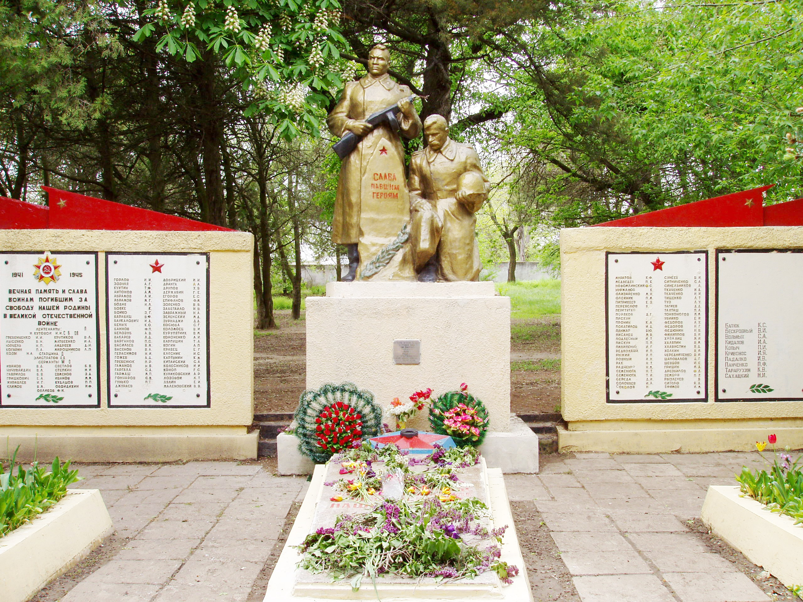 Мемориал на братской могиле в селе Садовом Мелитопольского района Запорожской области, Украина